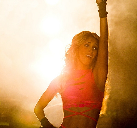 Anahí durante um show em 2008.